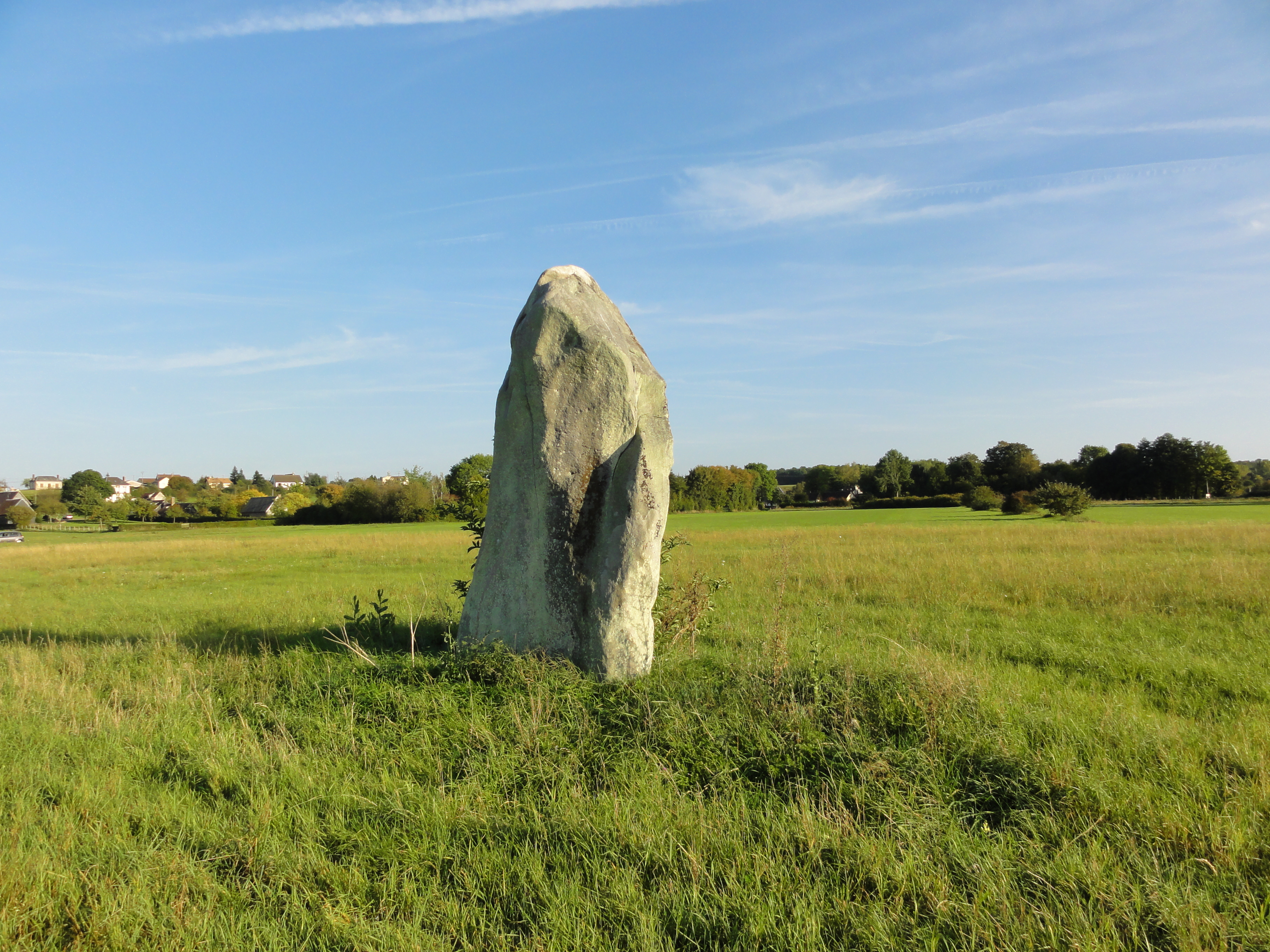 Menhir de Neaufles Auvergny, dit "la Pierre de Gargantua"